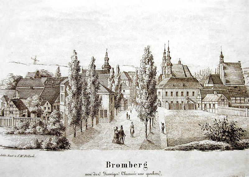 Ulica Gdańska w Bydgoszczy - obraz Carla Wilhelma Bellacha z l. 1830-1840